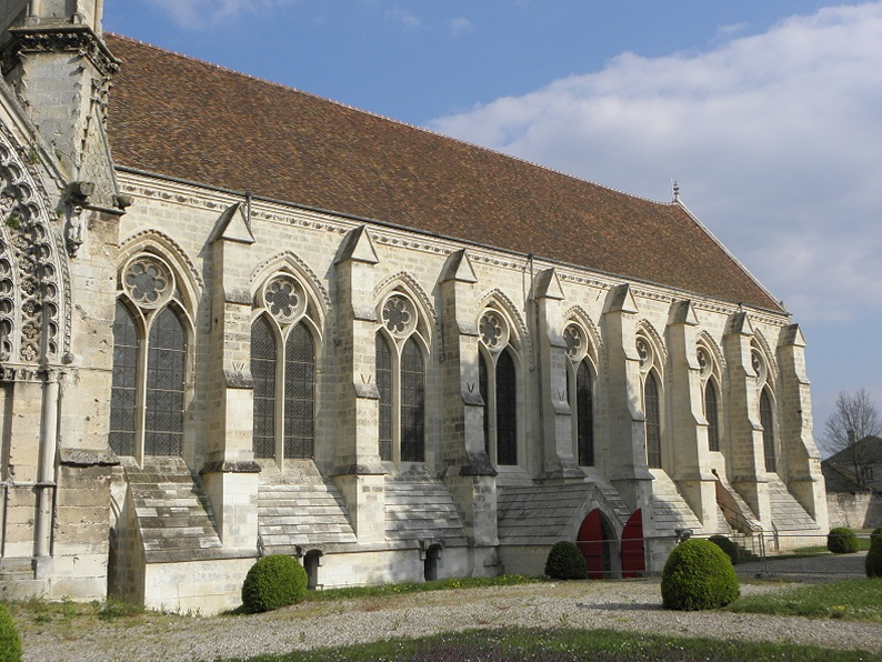 Vue occidentale du réfectoire de l'abbaye Saint-Jean-des-Vignes de Soissons (02).